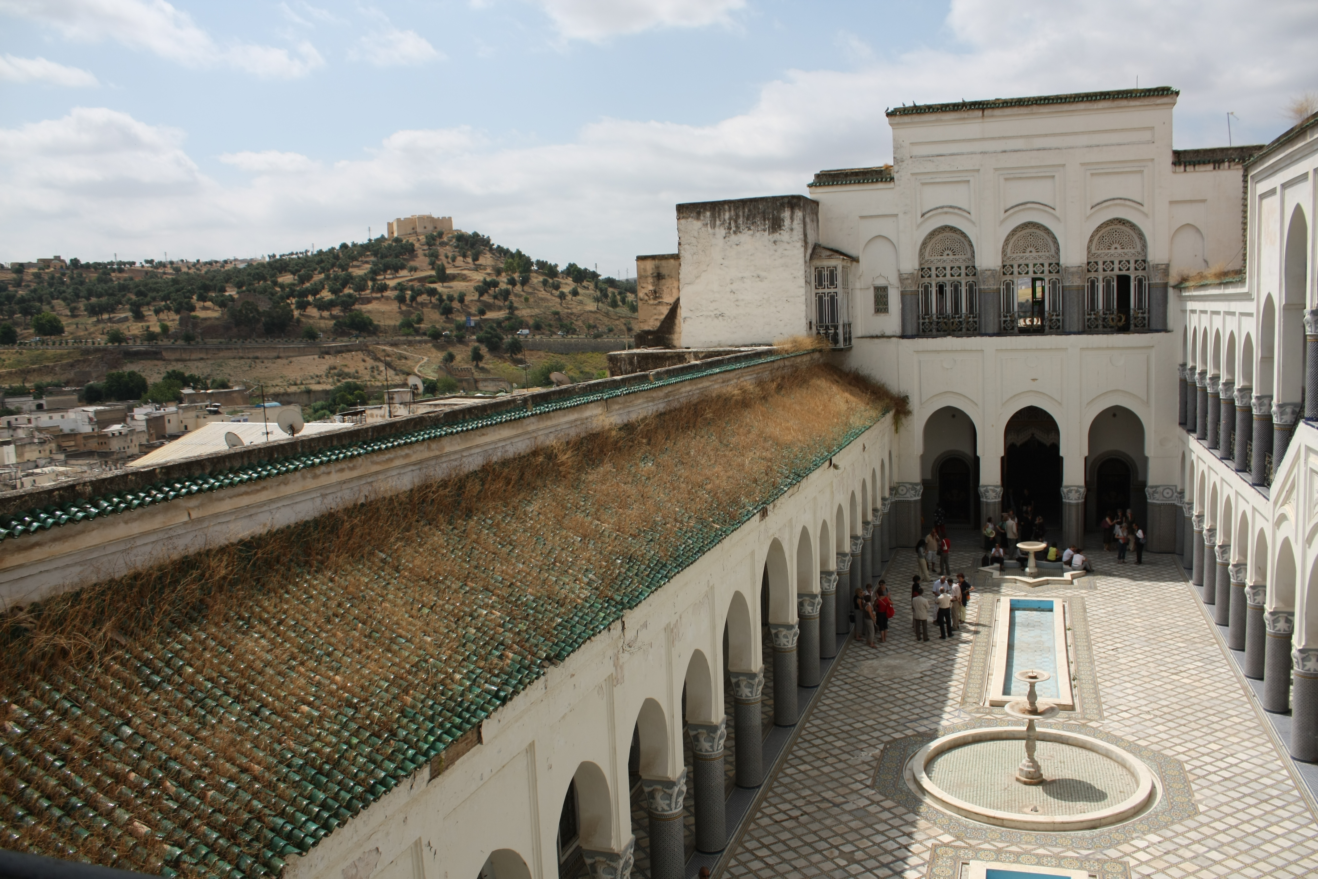 Dar Moqqri in Fes.